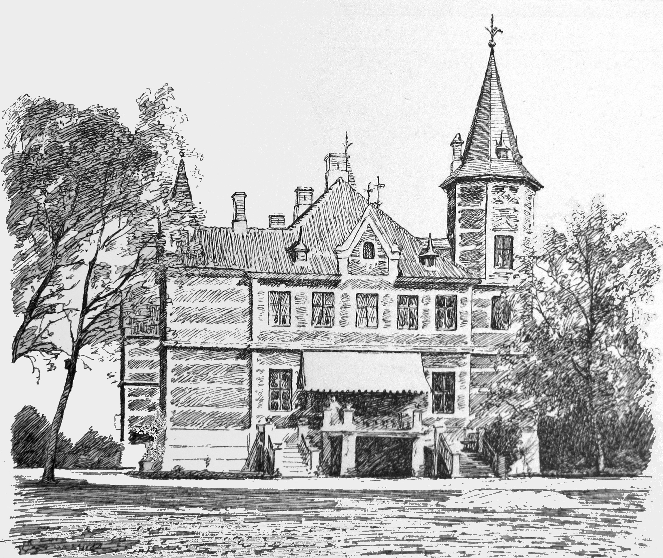 Giesegård er en hovedgård der er oprettet i 1668 af Frederik Giese. Gården ligger i Nordrupøster Sogn i Ringsted Kommune på Sjælland (Seeland Denmark)